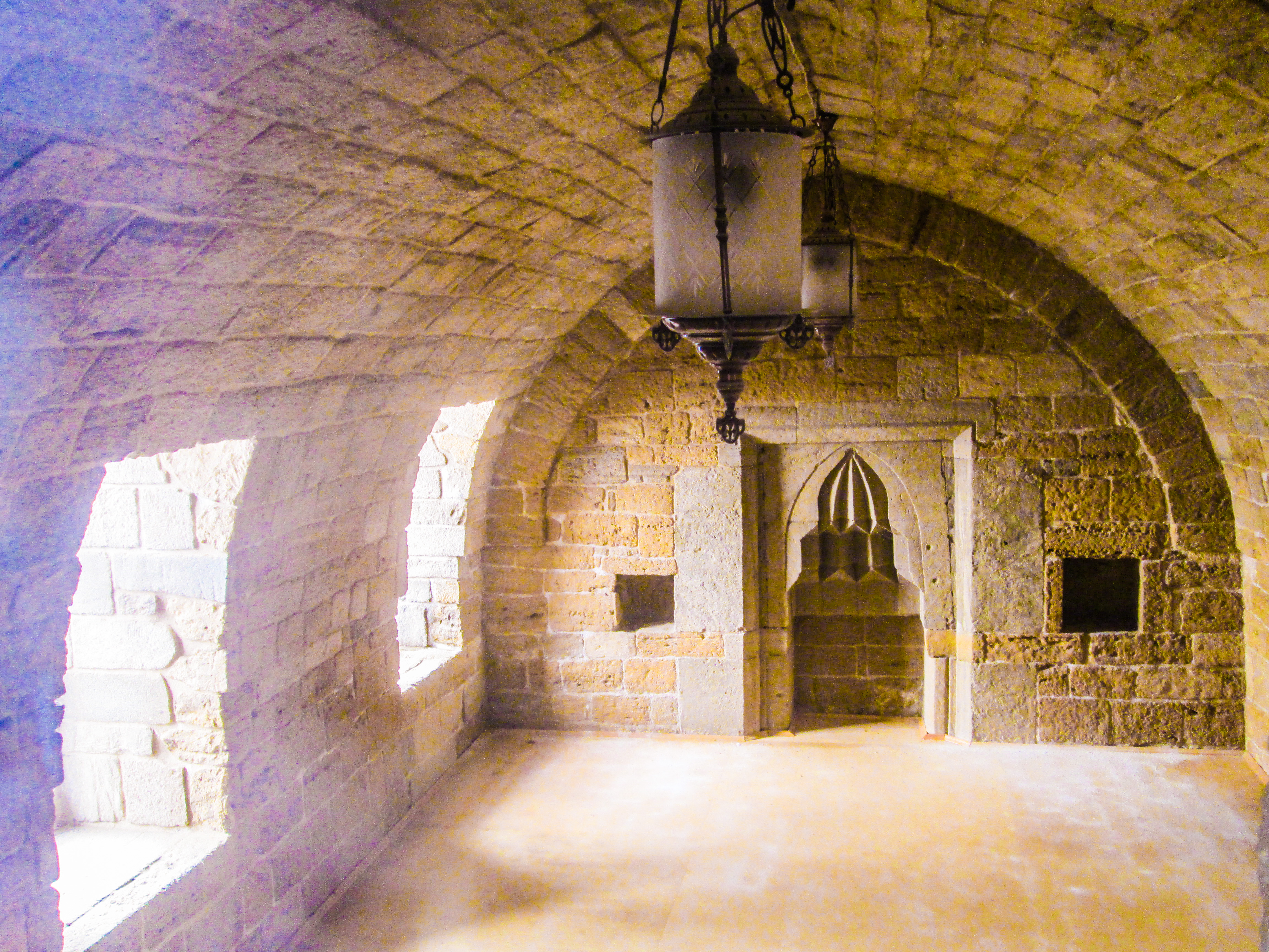 Cin məscidinin daxili